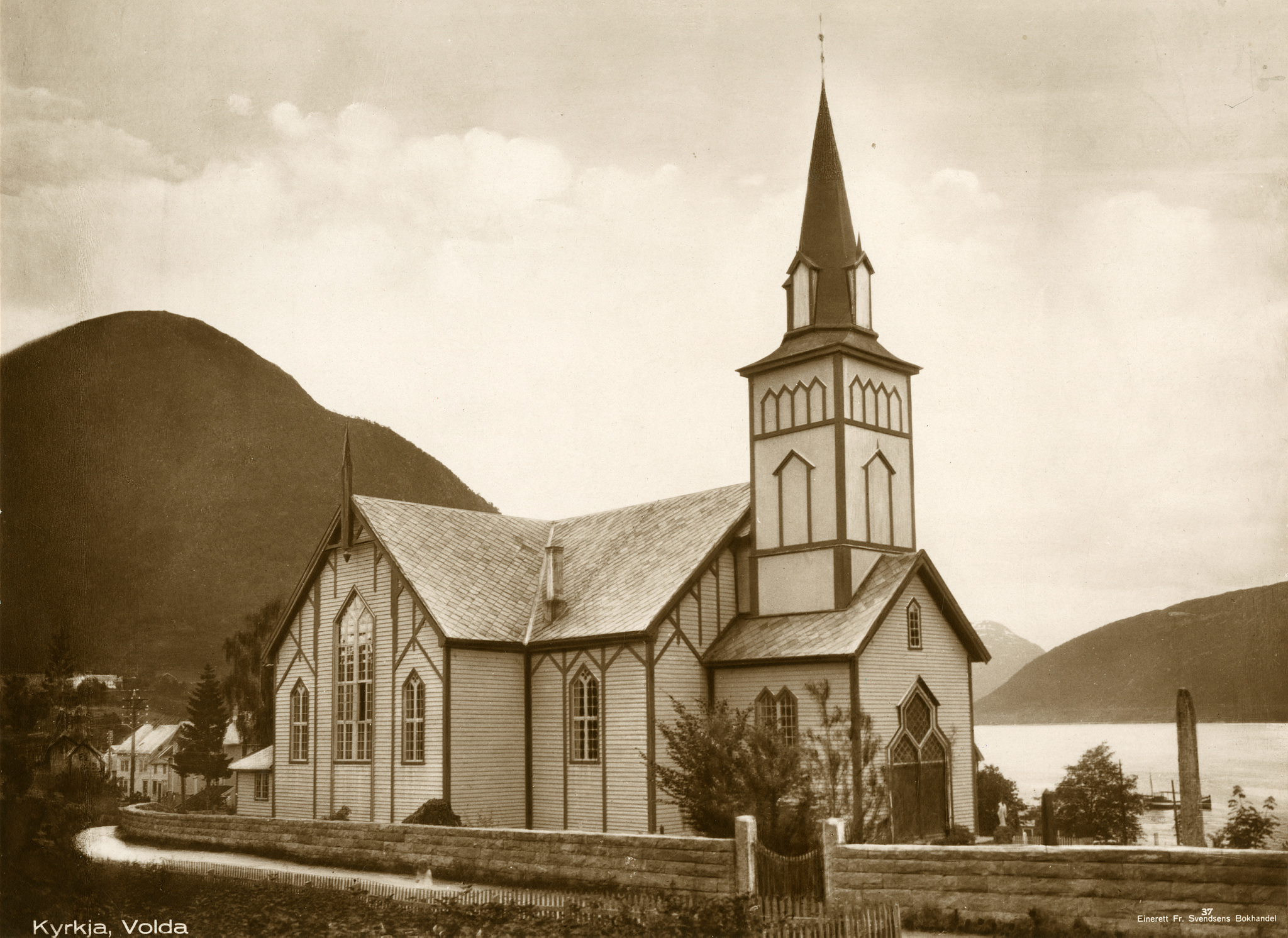 Volda kirke Einerett Fr. Svendsens bokhandel Brent 1929 Fra Kulturminnebilder.no